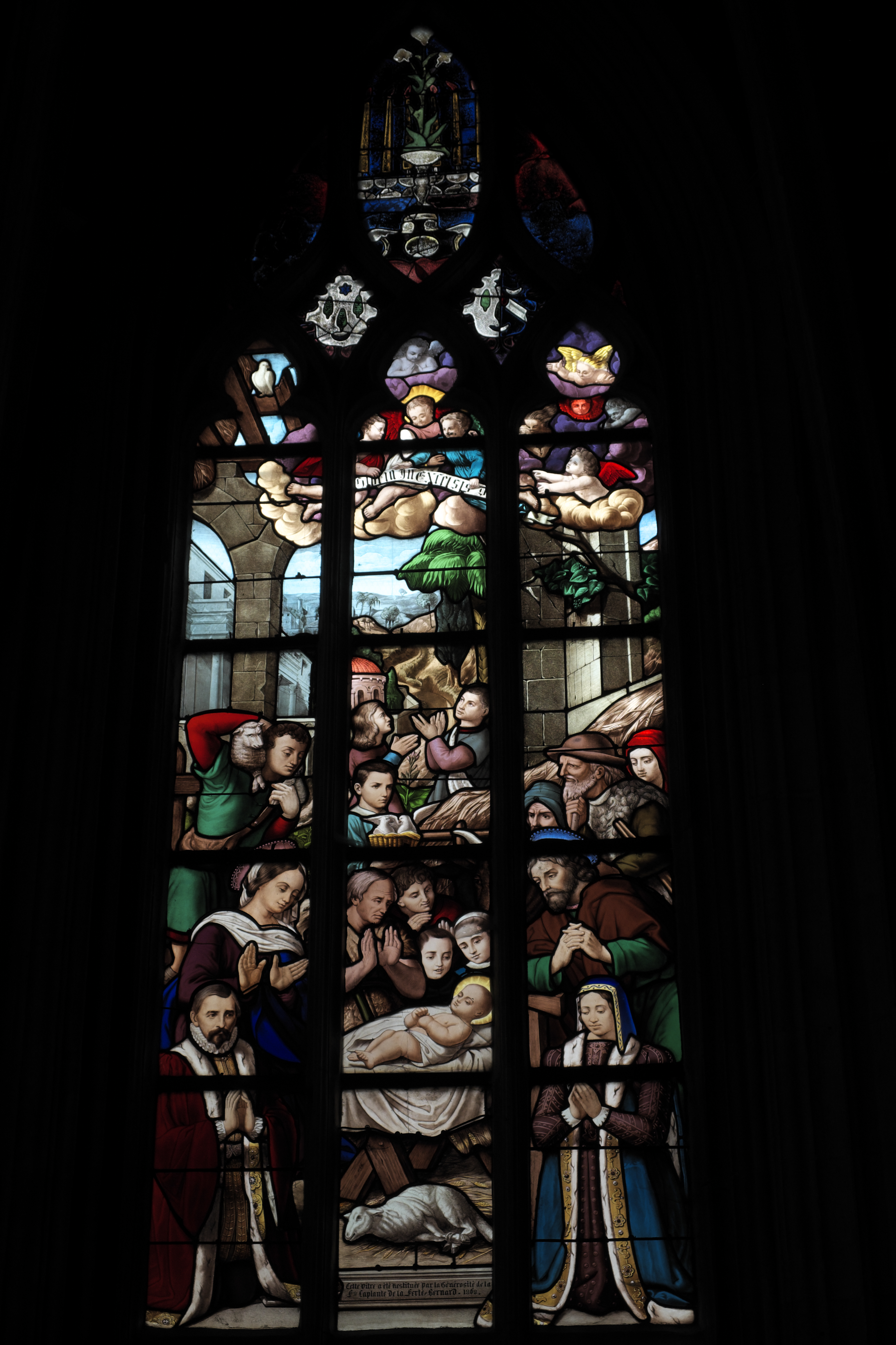 Katholische Pfarrkirche Notre-Dame-des-Marais in La Ferté-Bernard im Département Sarthe (Pays de la Loire/Frankreich), Bleiglasfenster (baie 2), mit Fragmenten aus der Zeit um 1534 von Jean Courtois im Maßwerk, Lanzetten von 1868, von Eugène Hucher, aus der Glasmalereiwerkstatt der Karmeliten von Le Mans (Carmel du Mans); Darstellung: Anbetung der Hirten